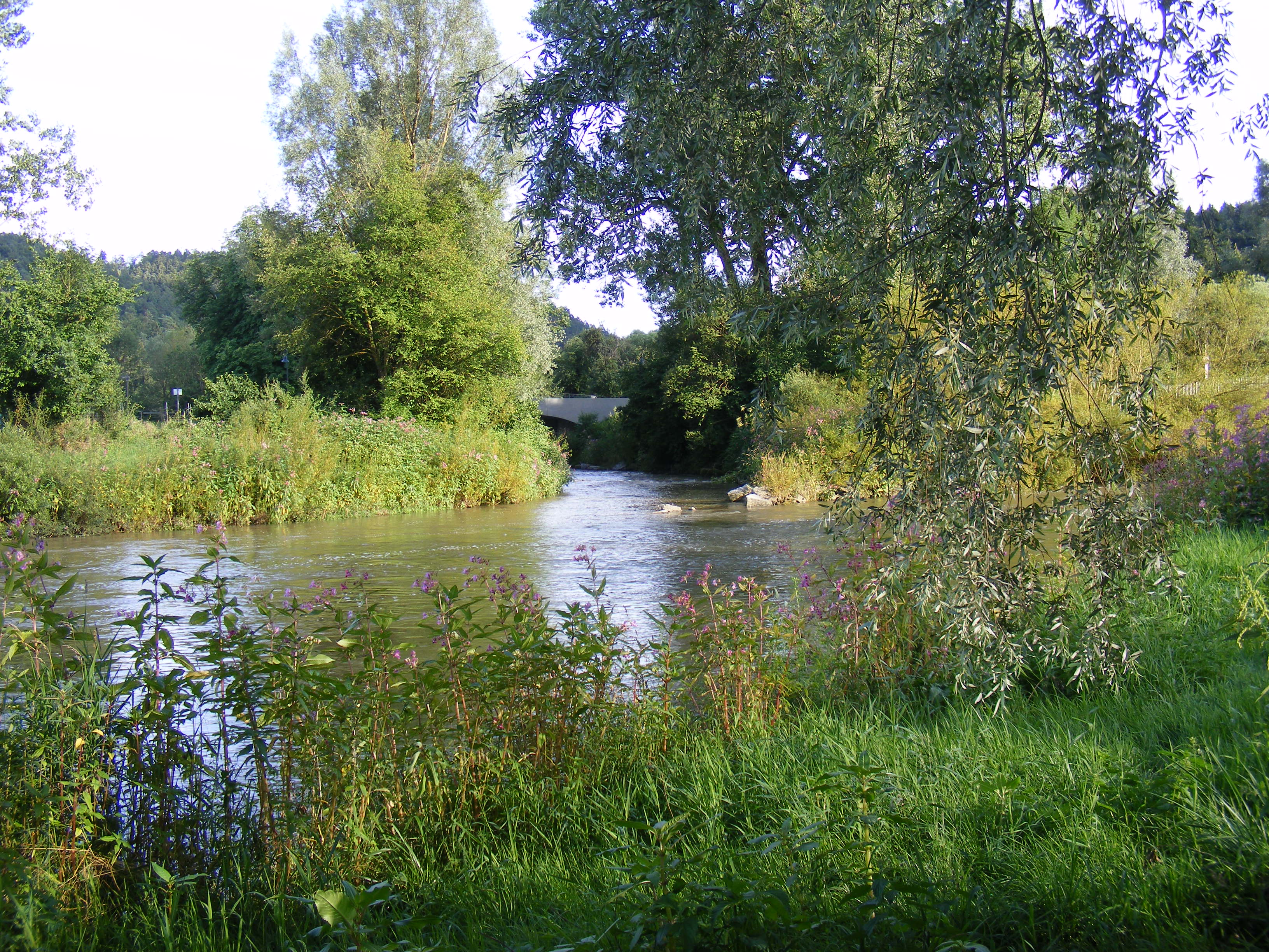 In Rottenburg-Bieringen mündet die Starzel in den Neckar